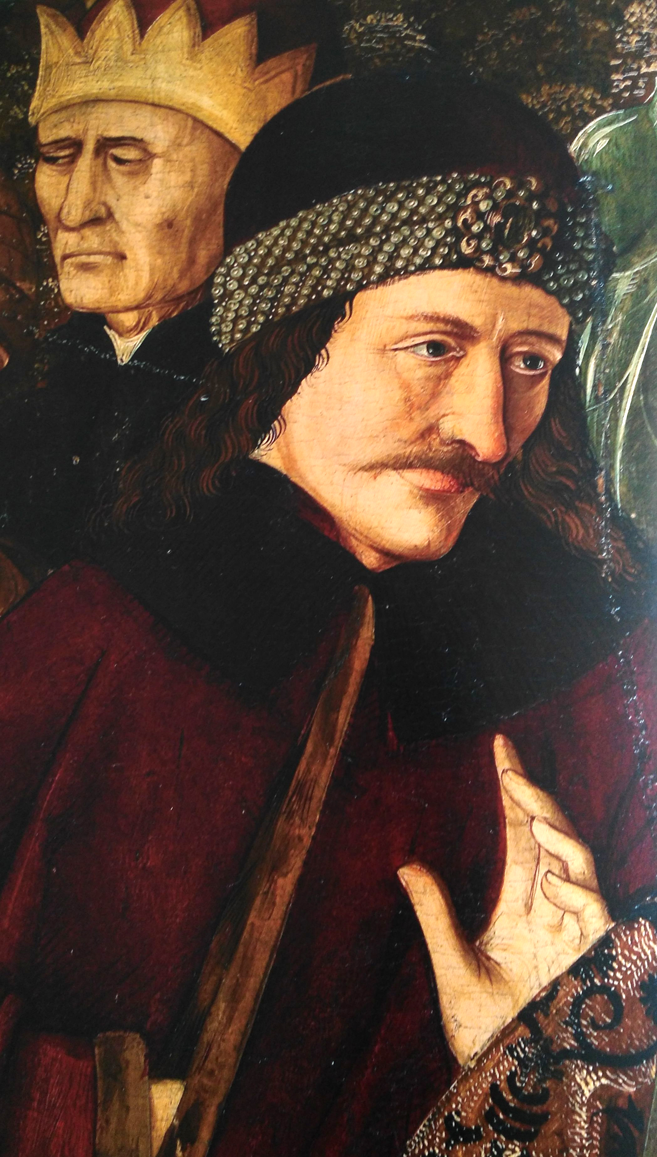 Meister von Maria am Gestade: Kreuzigung Christi. Ausschnitt von einem Altarflügelbild aus der Kirche Maria am Gestade in Wien, um 1460, Ölmalerei auf Holz, 202 x 161 cm. Die Gestalt von Vlad Tepes (der Mann mit der perlenbesetzten Mütze) misst ca. 110 cm.